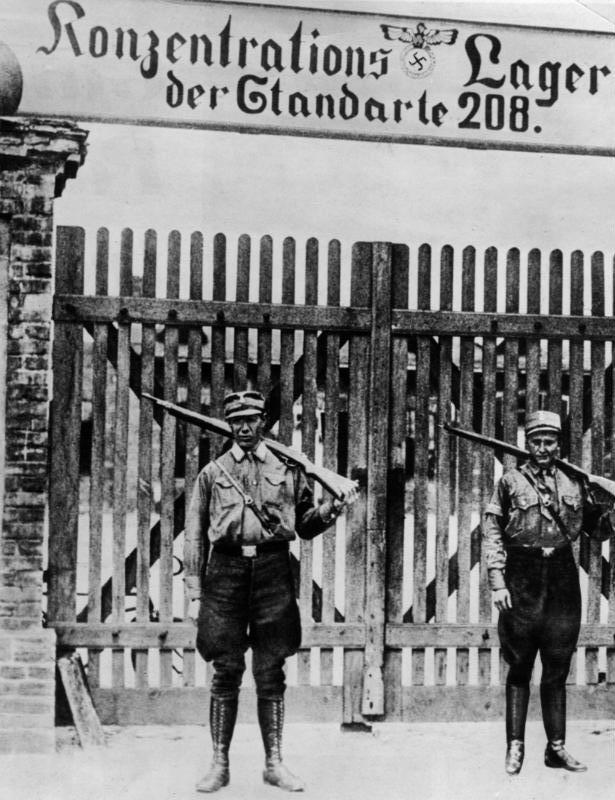 ADN-ZB: Im faschistischen Deutschland 1933-45 Unmittelbar nach der faschistischen Machtergreifung werden im Frühjahr 1933 überall im Land Konzentrationslager errichtet. SA-Männer als Lagerwache des KZs Oranienburg bei Berlin.